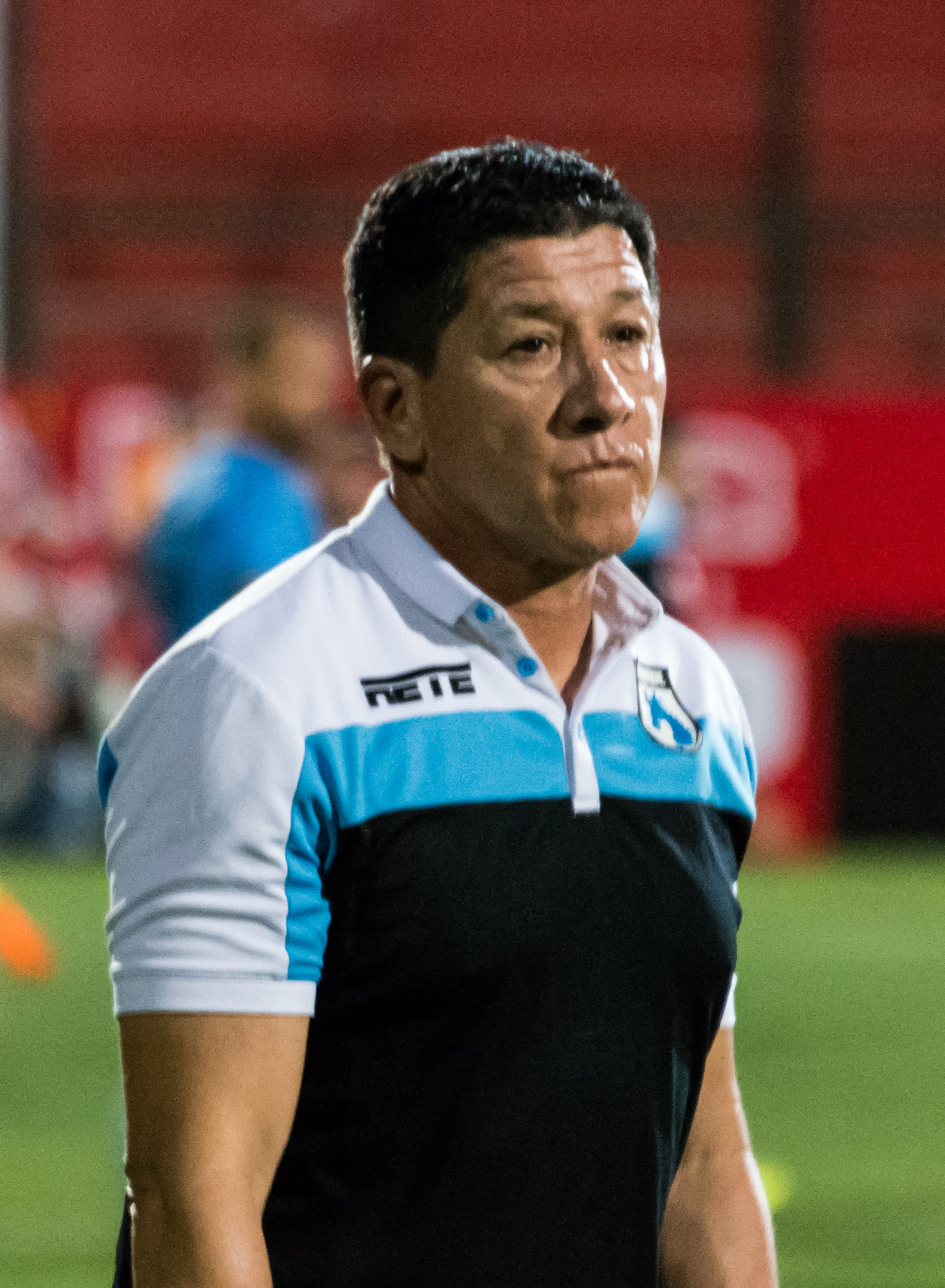 Unión Española v Deportes Iquique, Estadio Santa Laura, Independencia, Santiago, Región Metropolitana, Chile